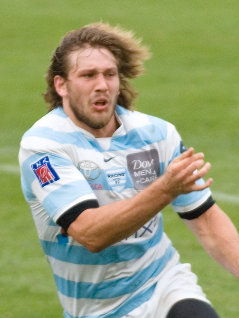 François Steyn avec le Racing Métro 92 face au Stade Toulousain au stade Yves-du-Manoir à Colombes (92). Top 14 2009-2010